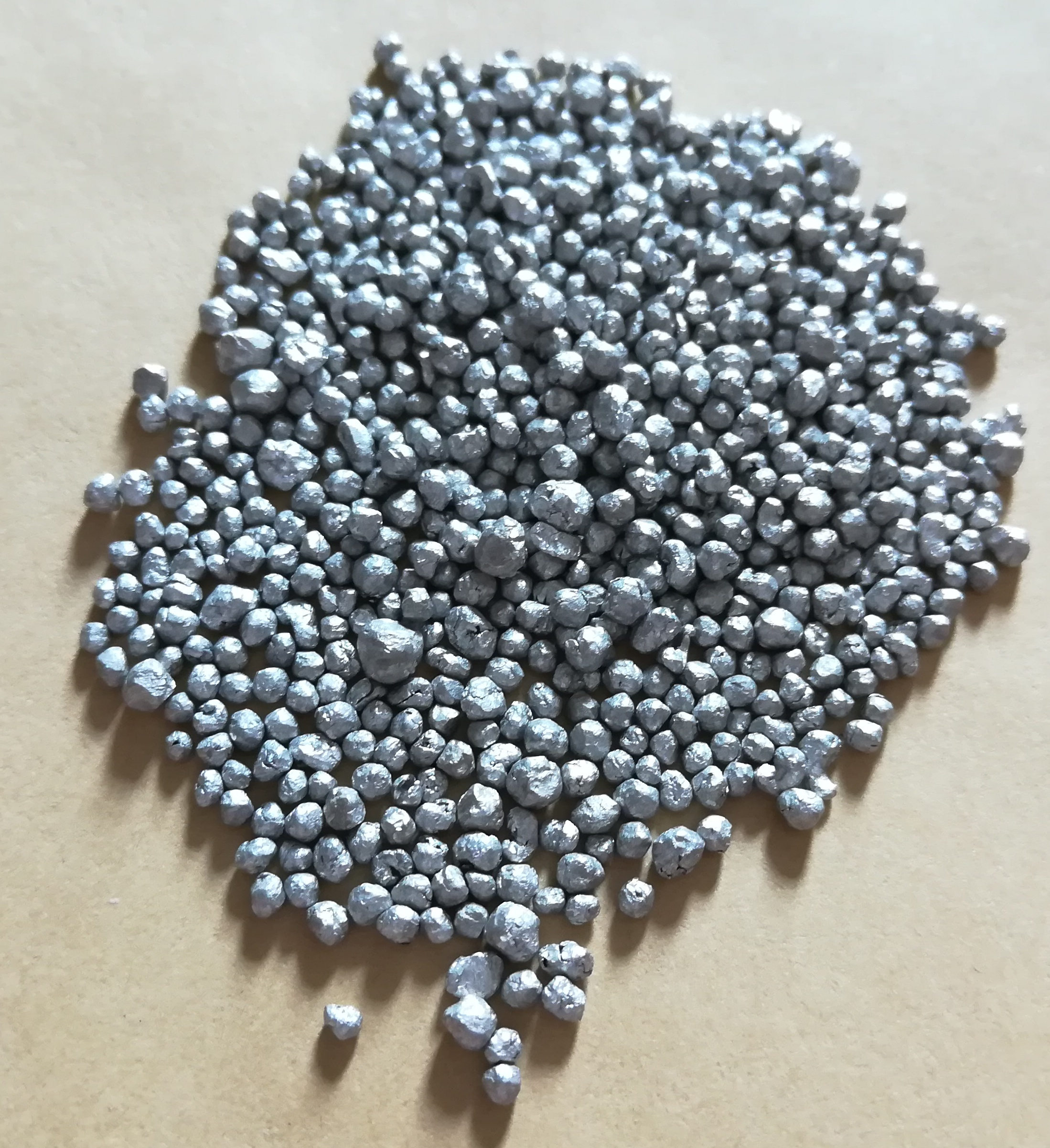 镁粒，1-3 mm，99.9%